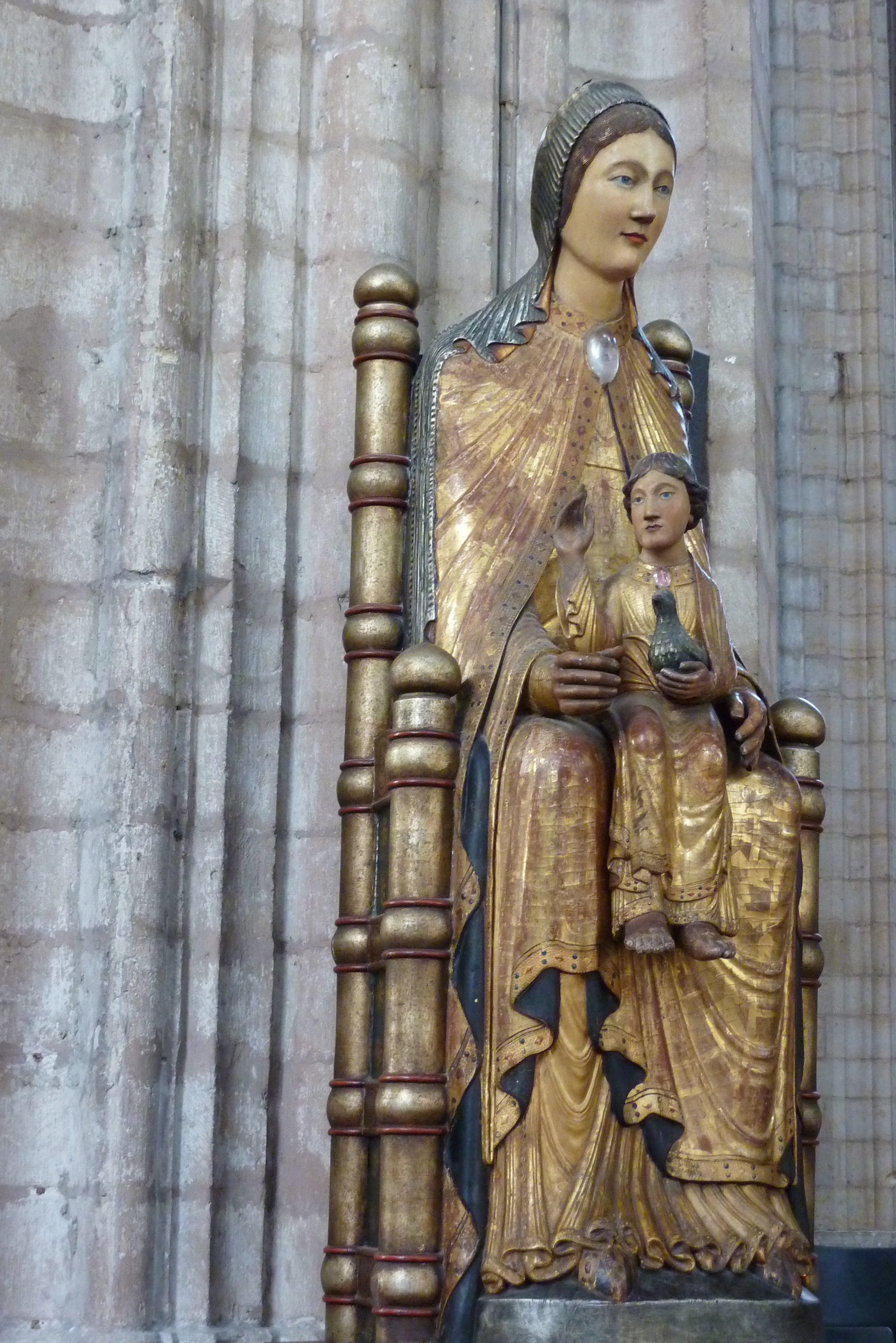 Ehemalige Kollegiatskirche Sint Pieter in Löwen in der Provinz Flämisch-Brabant (Belgien), Madonnenskulptur Sedes sapientiae